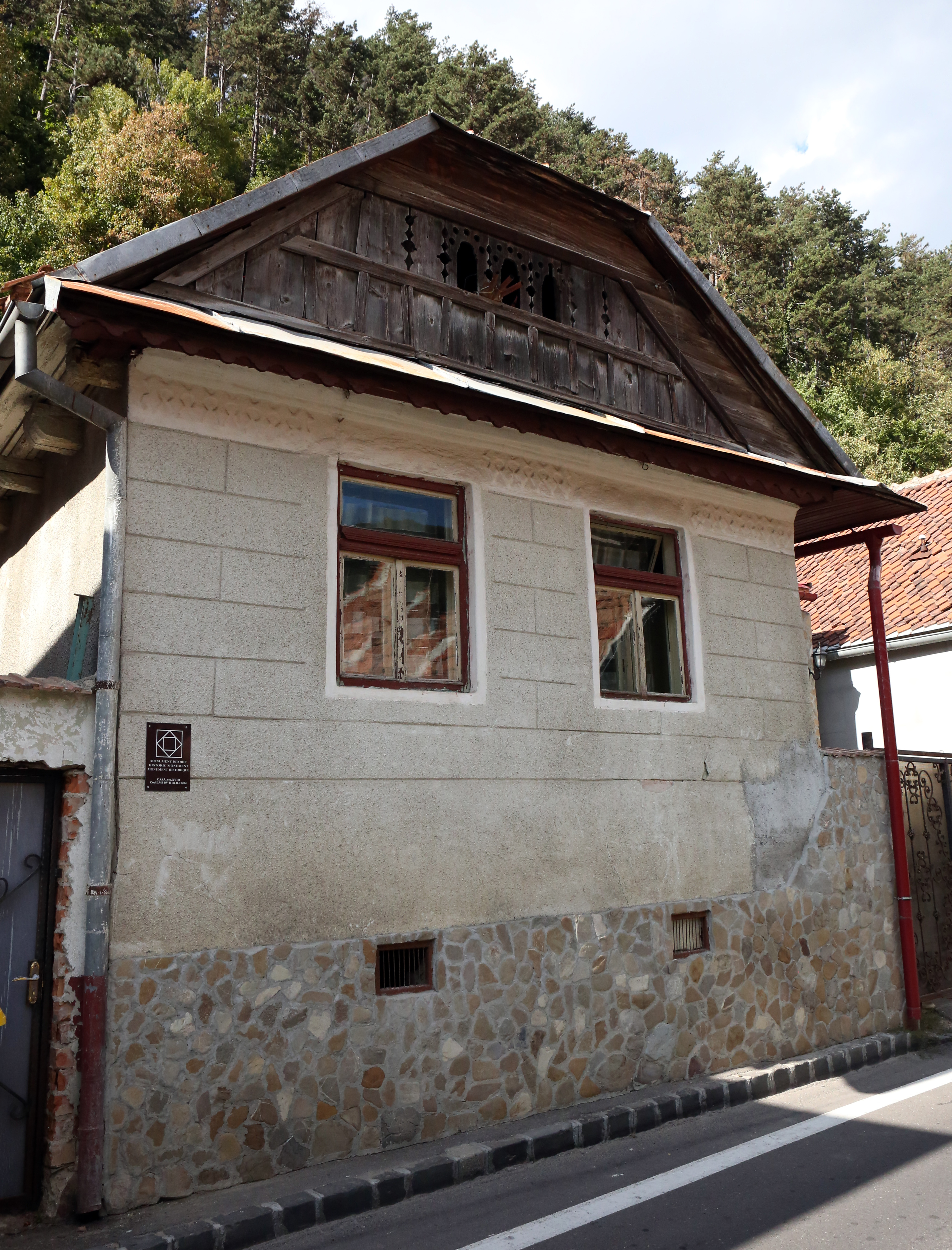 Casă - Str. Pe Tocile 110